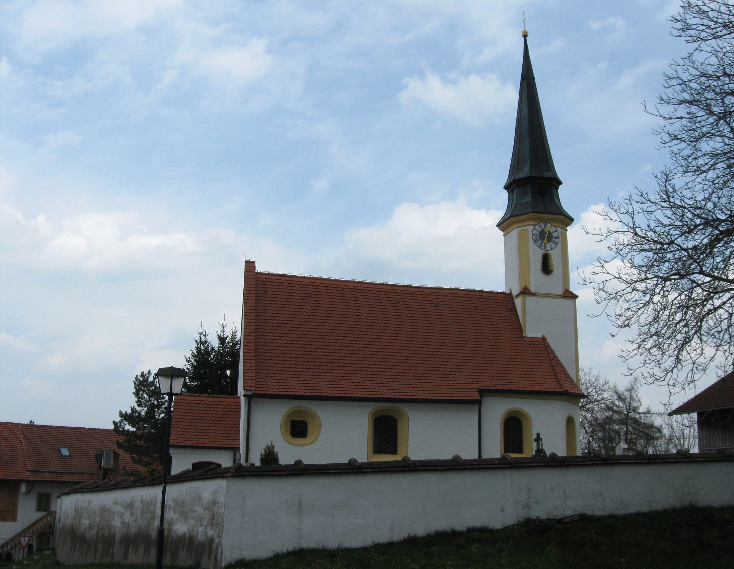 Kirche St. Valentin in Aufhofen, einem Ortsteil von Egling